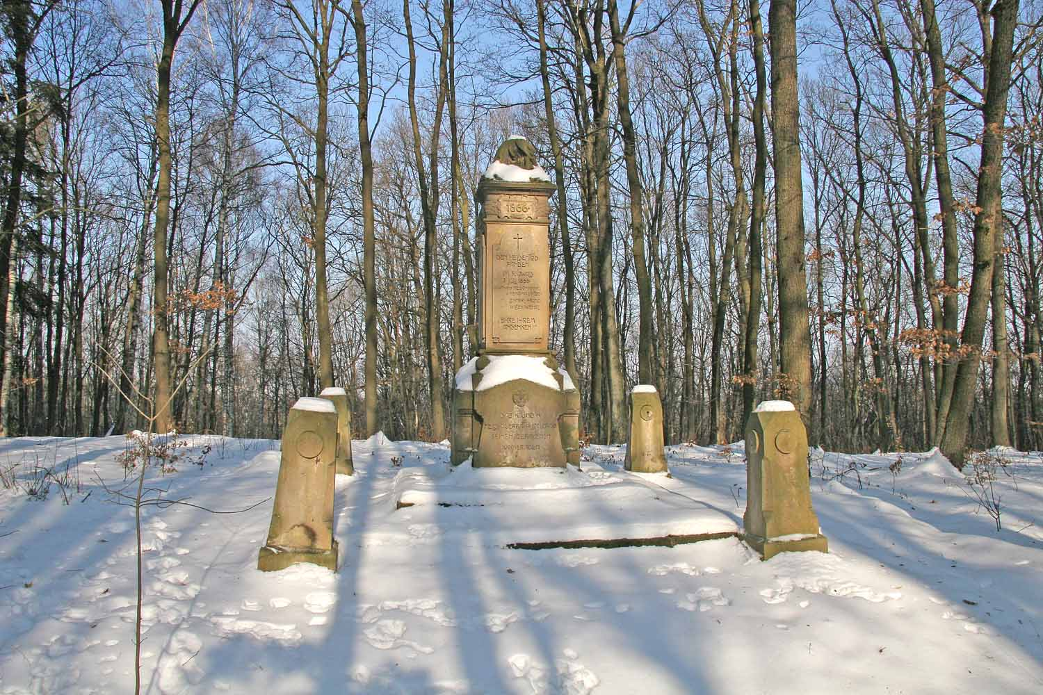 Pomník z války roku 1866